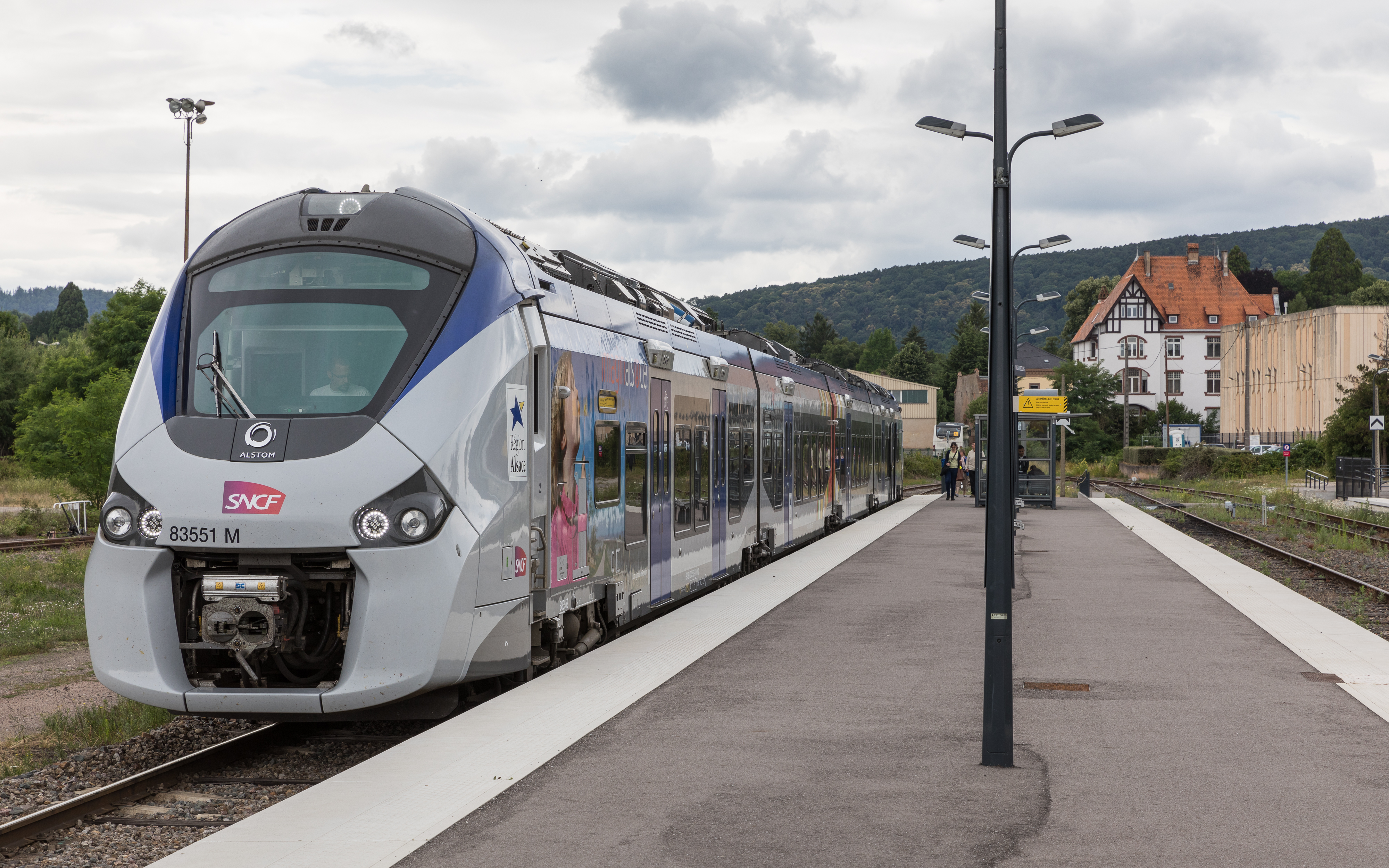 SNCF TER Alsace B 83551 M im Bahnhof Wissembourg/Alsace